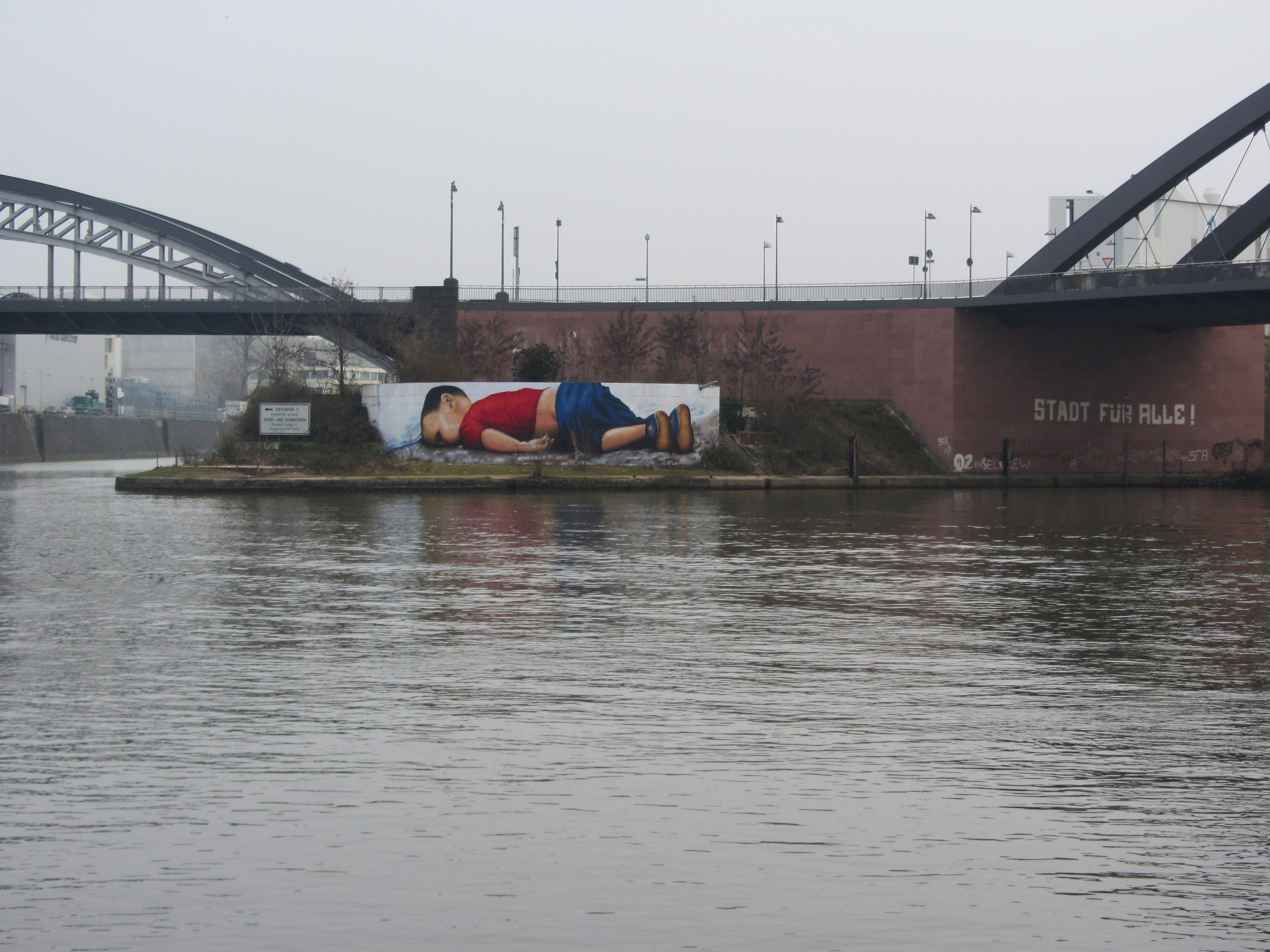 Graffiti-Kopie des Fotos der angeschwemmten Leiche von Alan Kurdi. Ein Werk der Künstler Justus "Cor" Becker und Oguz Sen an der Osthafenmole in Frankfurt am Main, Titel „Europa tot – Der Tod und das Geld“